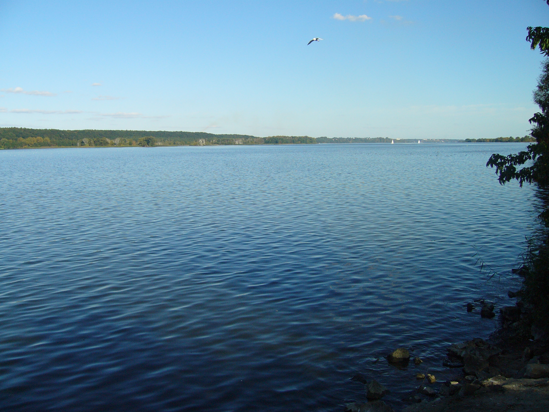 Zbiornik Włocławski na Wiśle